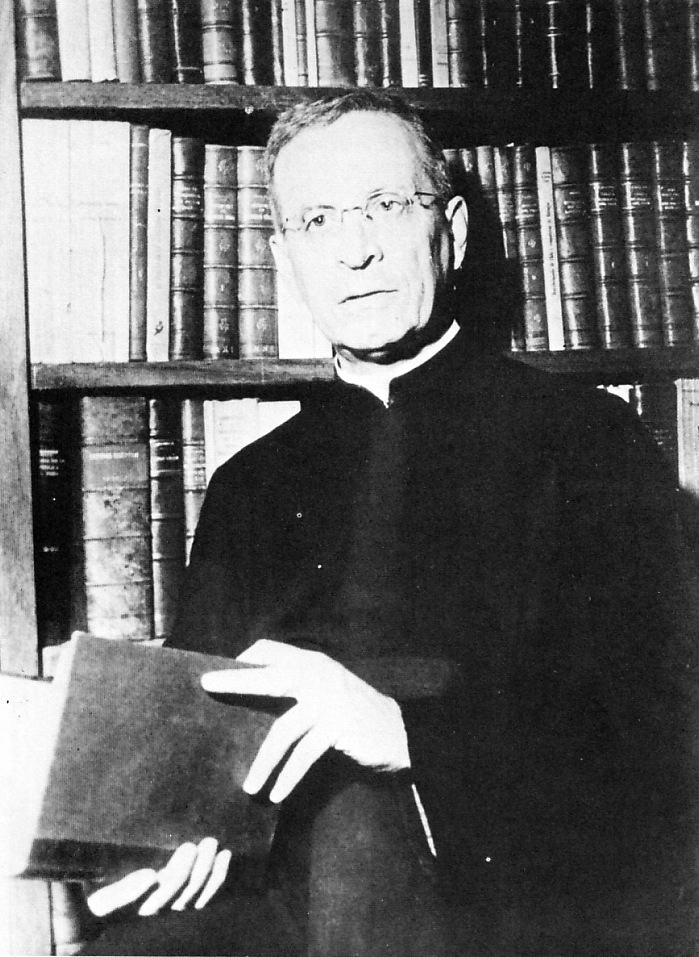 Rubén Vargas Ugarte (Lima, 1886 - 1975) Sacerdote Jesuita e historiador peruano.